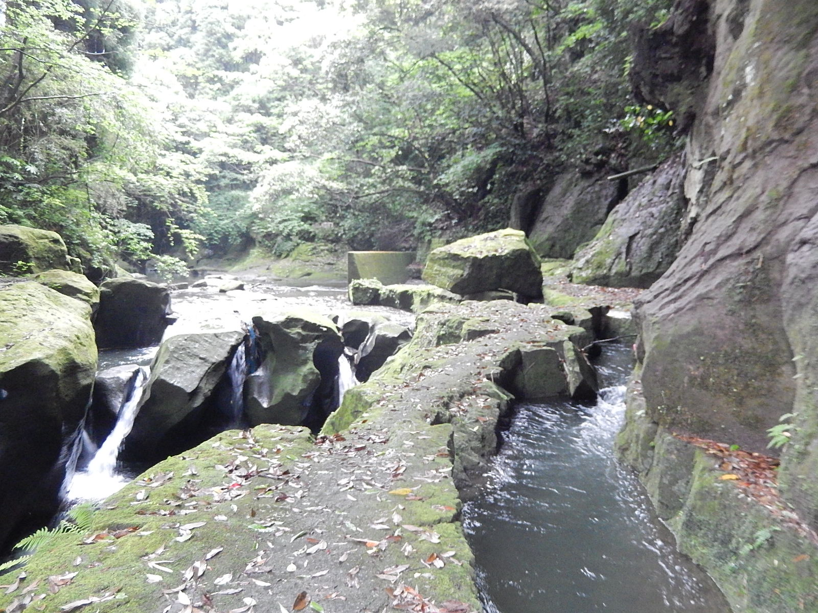 世界遺産推薦物件「明治日本の産業革命遺産群」構成資産、旧集成館・関吉の疎水溝（分水嶺）